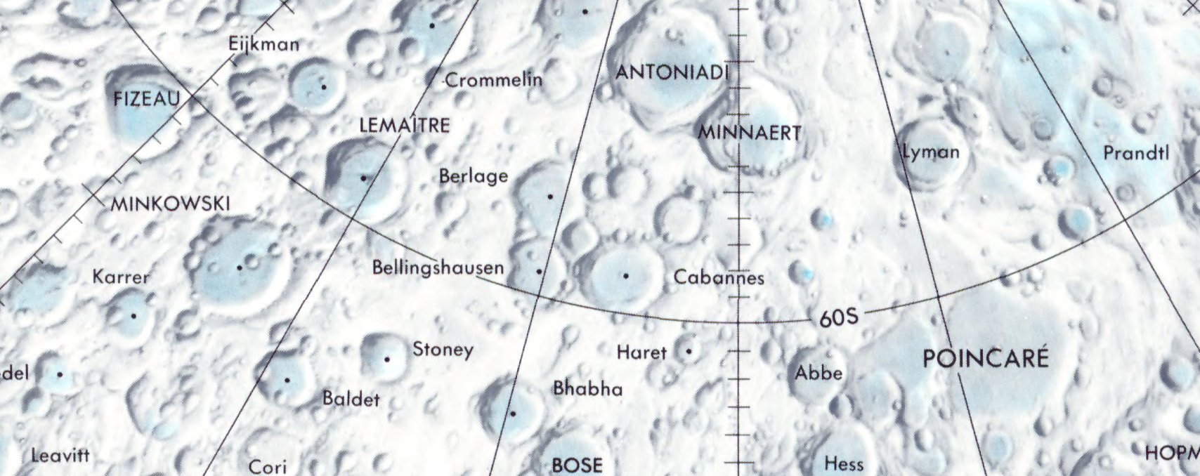 Cráter lunar Bellinsgauzen. Localización. (Lunar Chart LPC1. Second Edition)